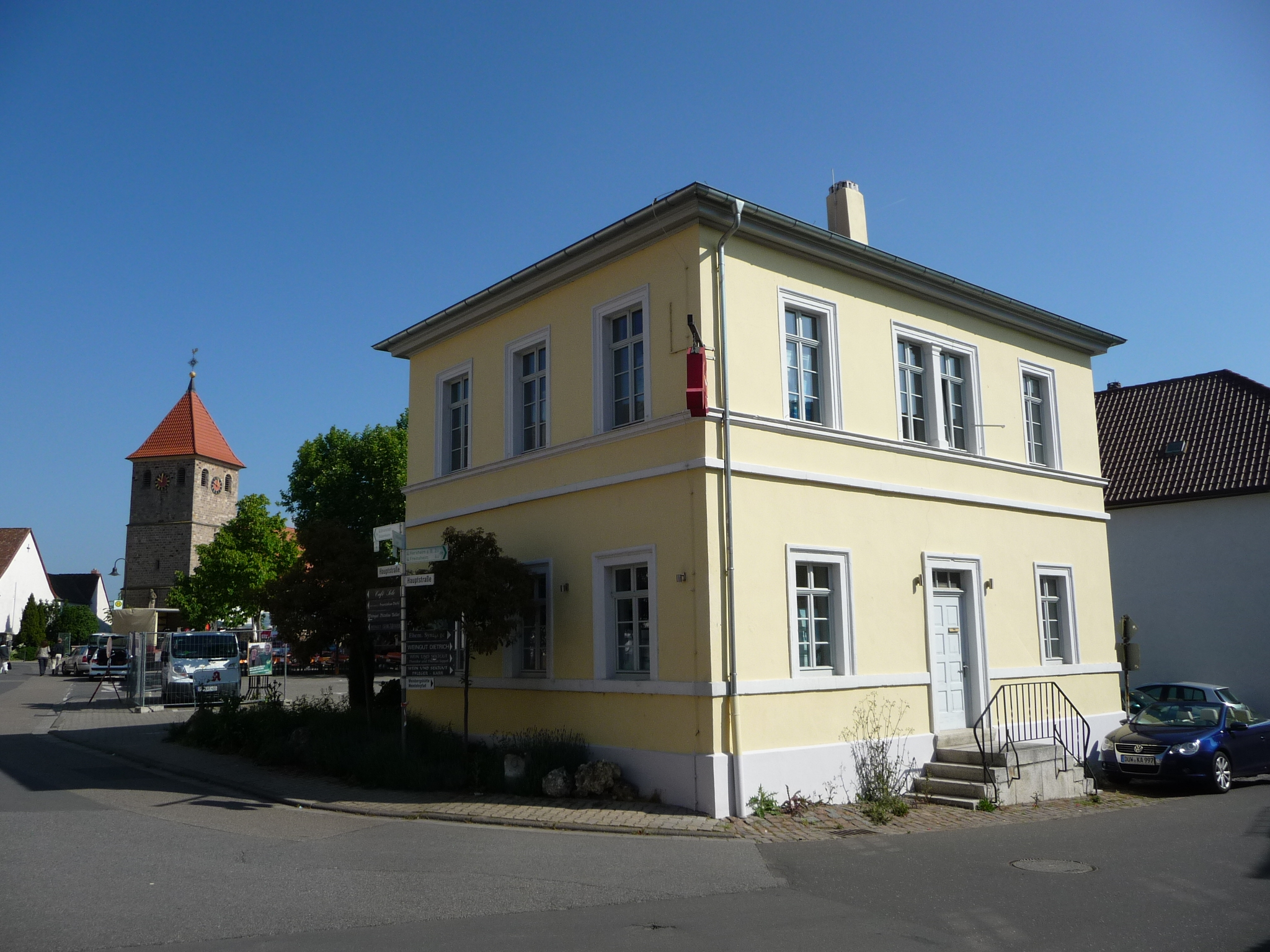 Weisenheim am Berg ist eine Ortsgemeinde im Landkreis Bad Dürkheim in Rheinland-Pfalz.